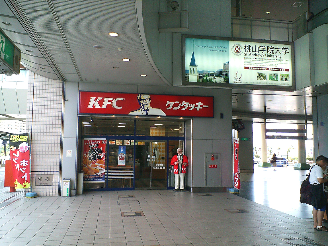 投稿者自身が『ケンタッキーフライドチキン 泉北和泉中央店』（大阪府和泉市いぶき野5-1-1）を撮影。